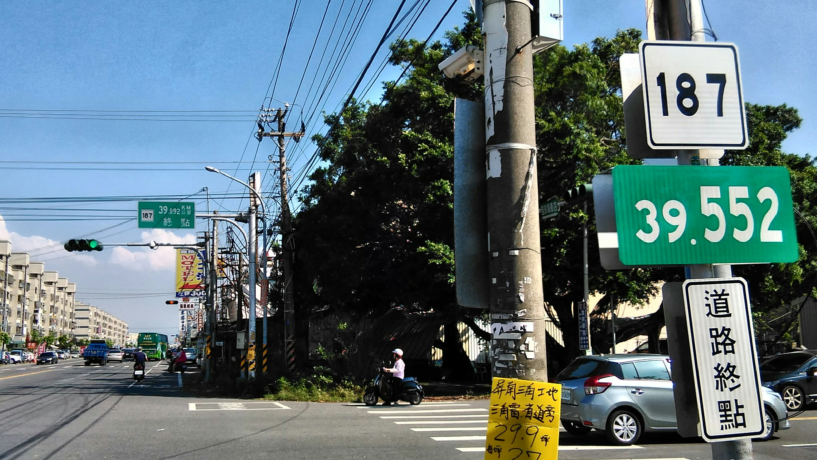 中華民國（臺灣）縣道187號的終點，位於屏東縣東港鎮。